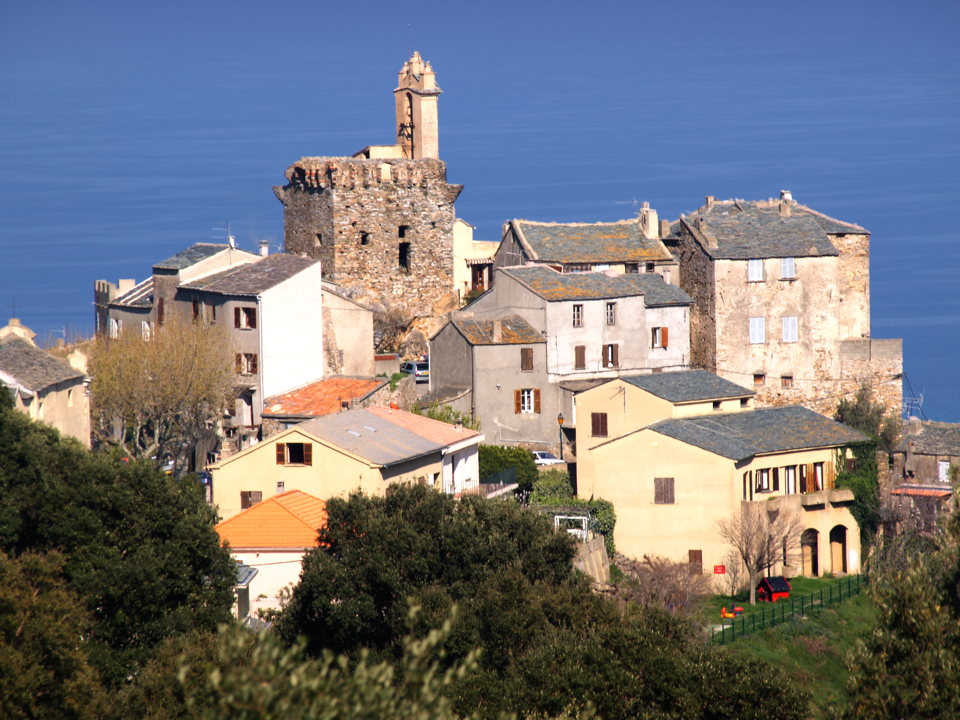 Furiani (Corsica) - Le village (205 m)